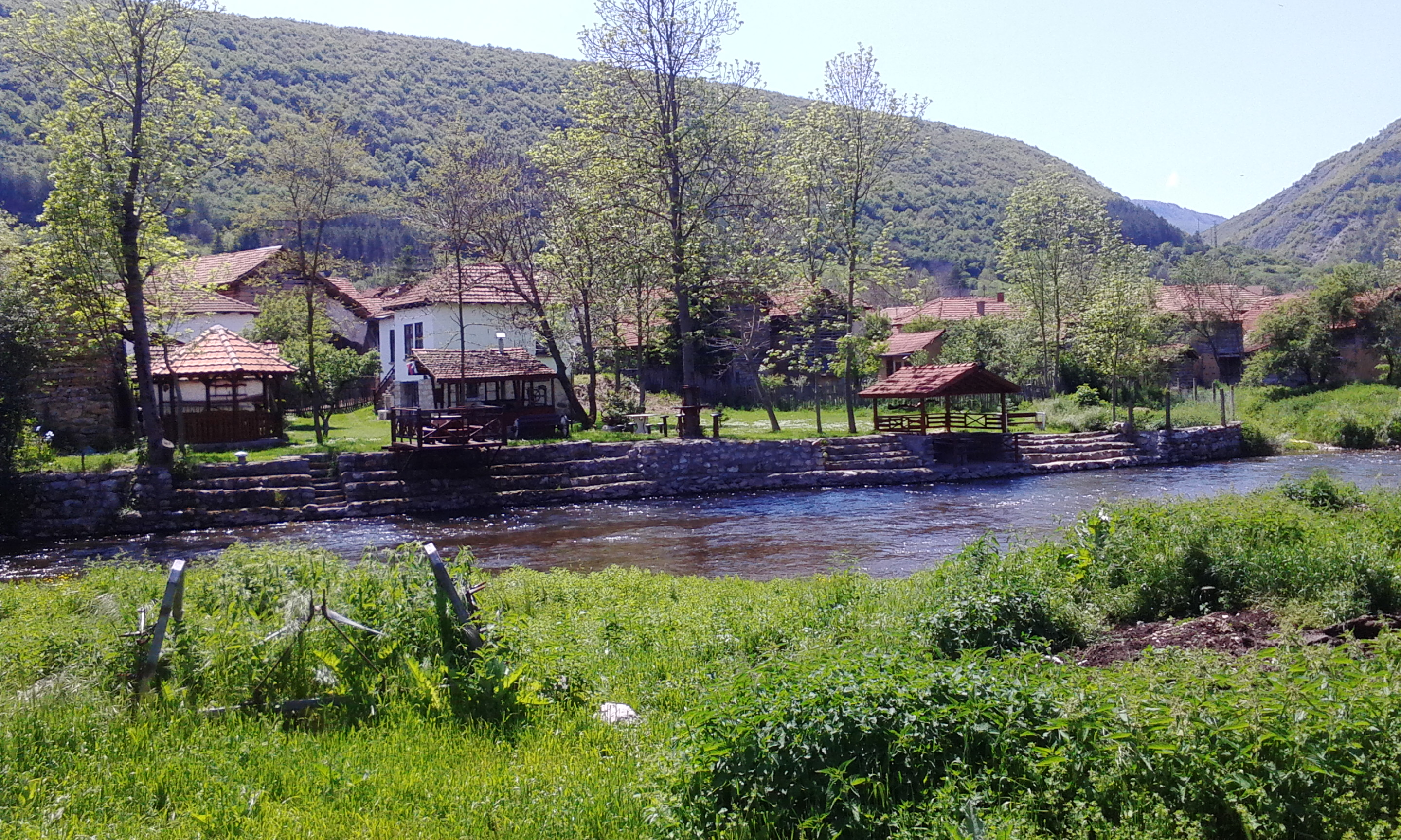 Ово је фотографија заштићеног природног добра у Србији под шифром: ПП16This is a a photo of a natural area in Serbia with ID: ПП16 Selo Rsovci, reka Visočica, opština Pirot, Park prirode Stara planina